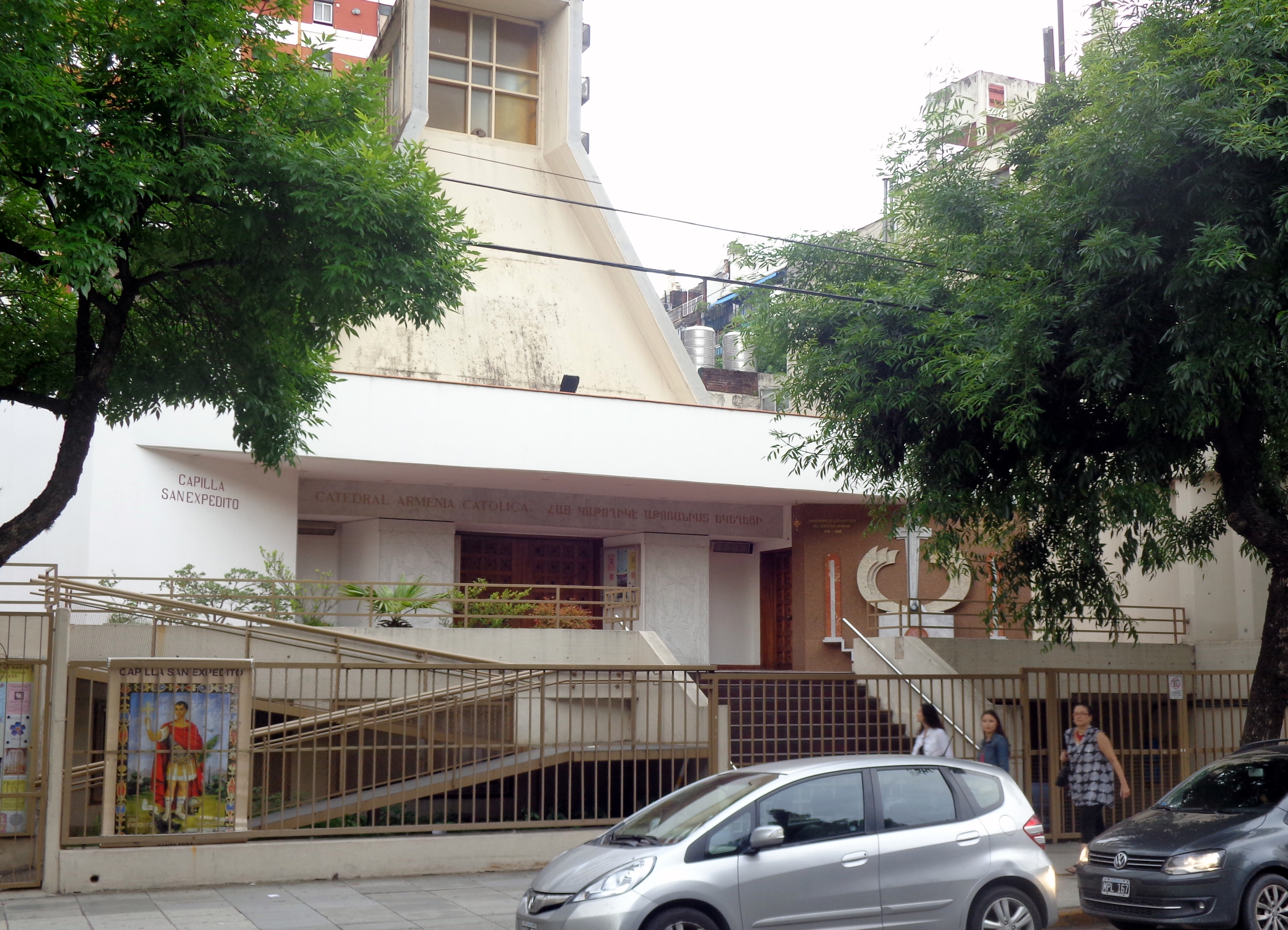 Parroquia armenia católica Nuestra Señora de Narek, en calle Charcas 3529, Palermo, Buenos Aires, Argentina.